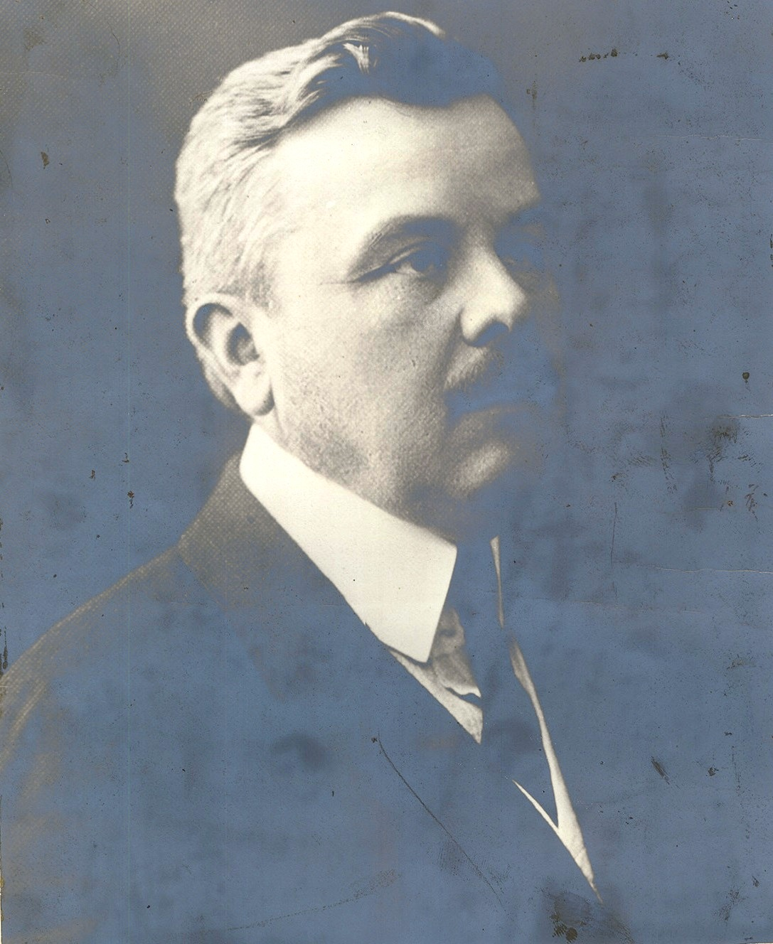 Zichy János, gróf (Nagyláng, 1868. május 30. – Nagyláng, 1944. január 6.) agrárius nagybirtokos, miniszter, legitimista politikus, a Magyar Tudományos Akadémia igazgató tagja (1925)